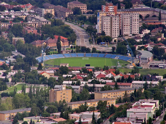 Kosice